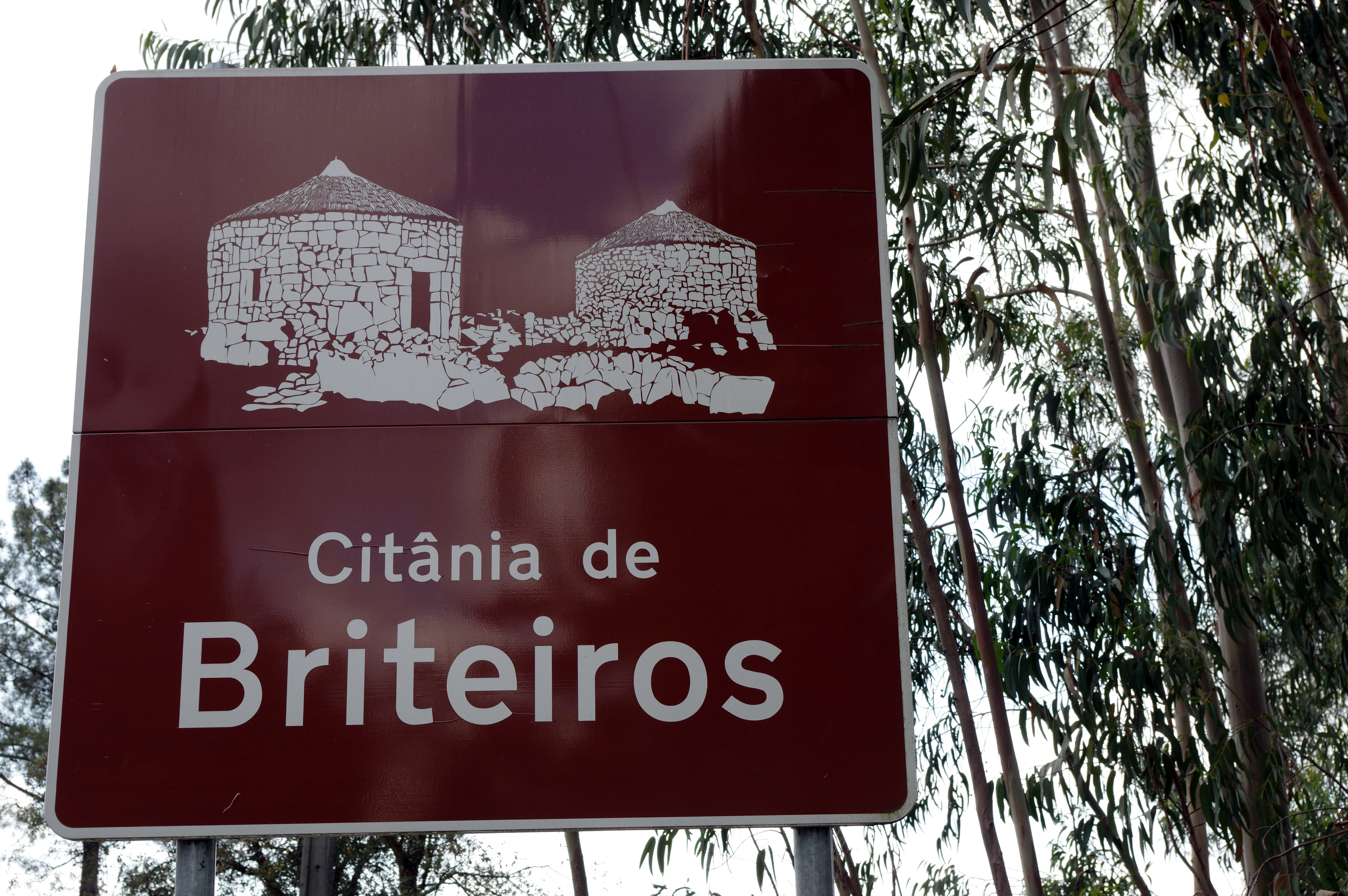 23.4.14 Briteiros 051